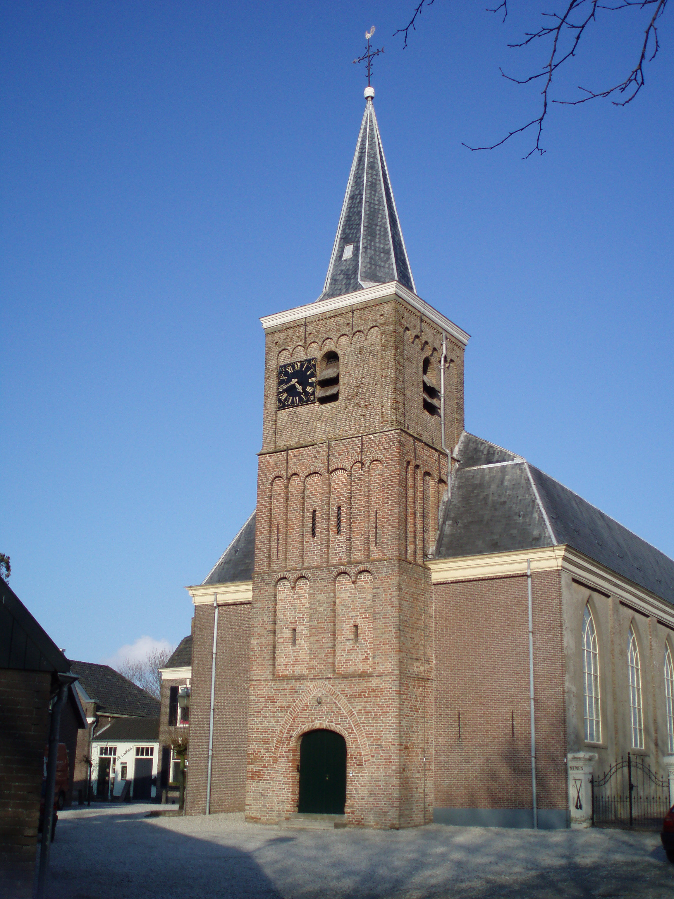 De hervormde kerk van Polsbroek.